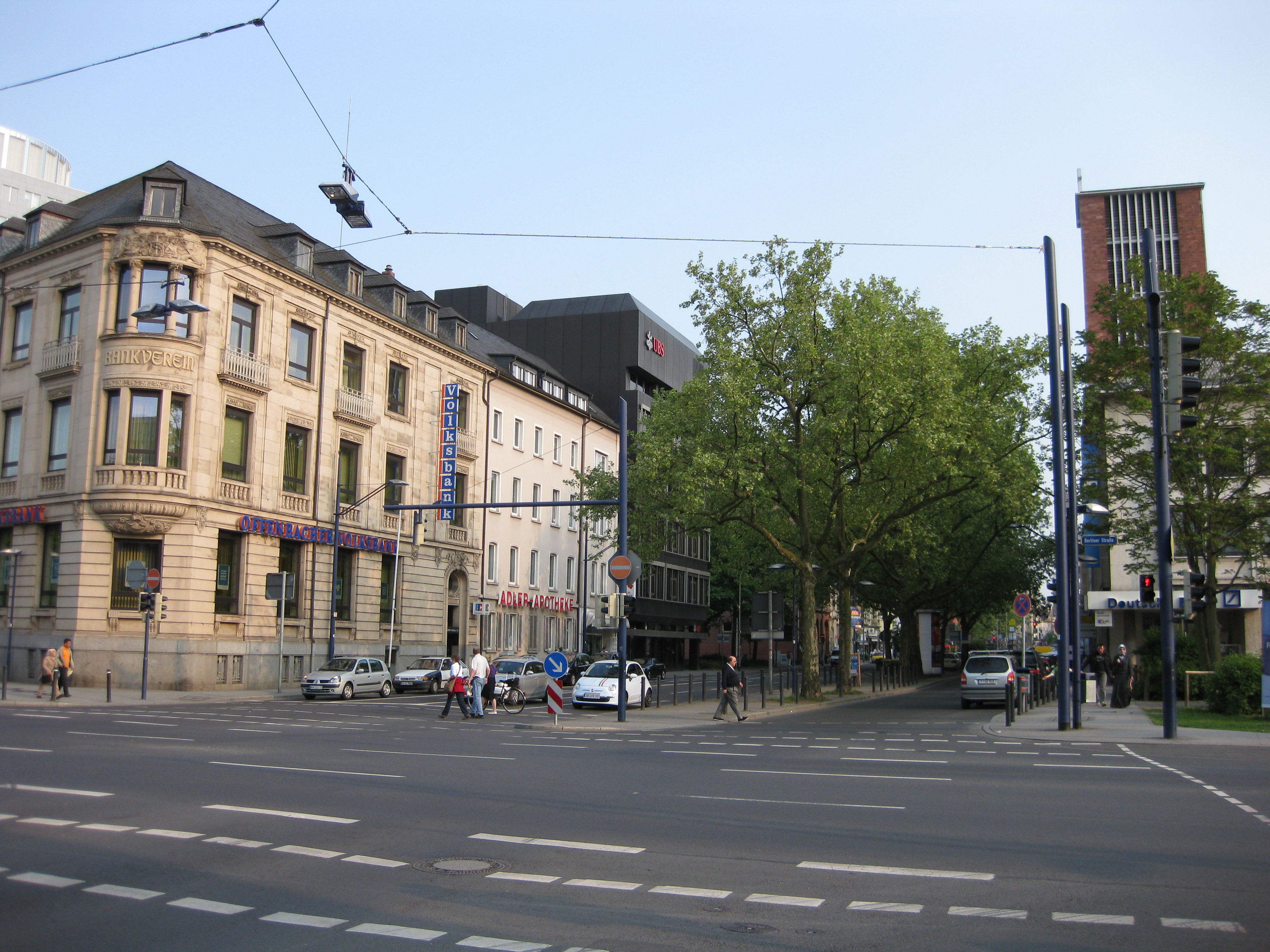 Kaiser- Ecke Berliner Straße, Offenbach